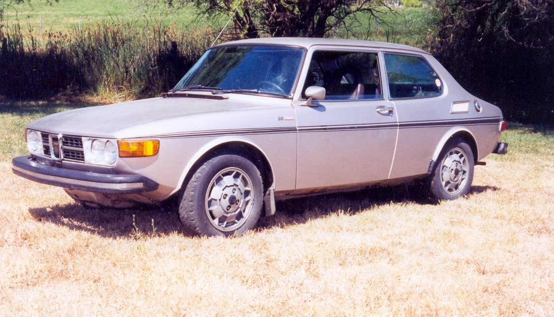 Saab 99 EMS 1974 (US Spec)